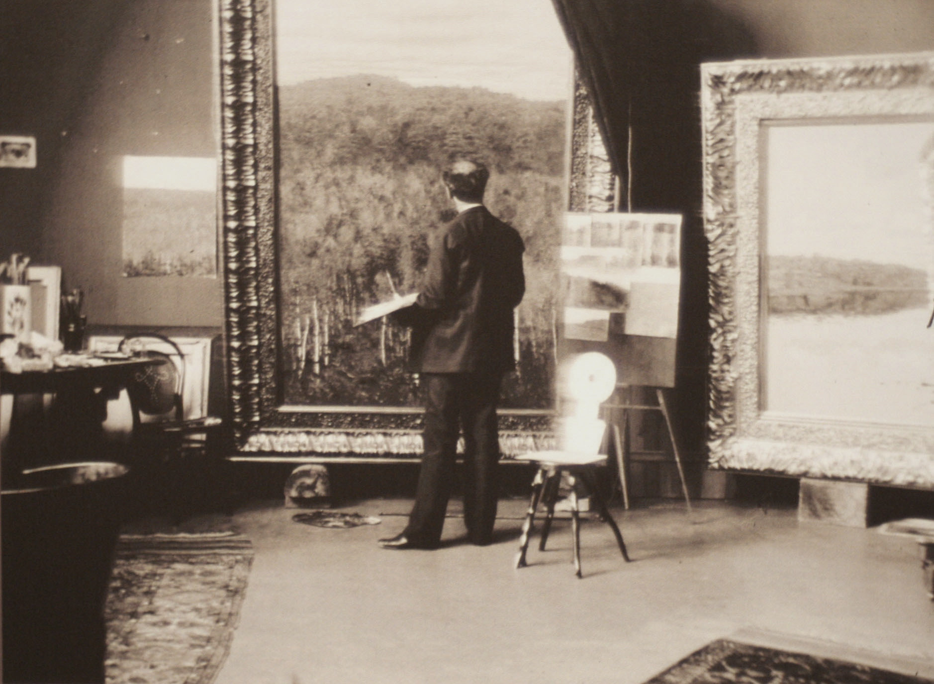 Исаак Ильич Левитан за работой в своём доме-мастерской , где было создано много знаменитых полотен художника - "Вечер. Золотой Плес", "После дождя. Плес". Валентин Серов написал здесь портрет художника.